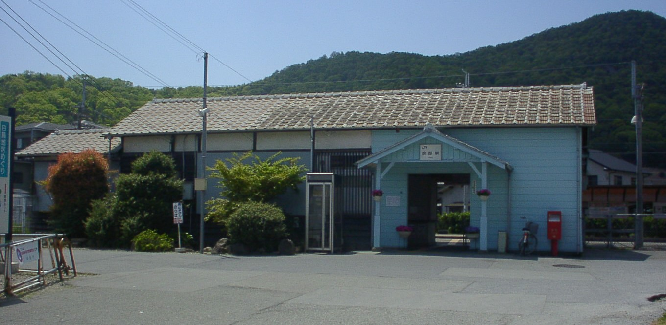 余部駅